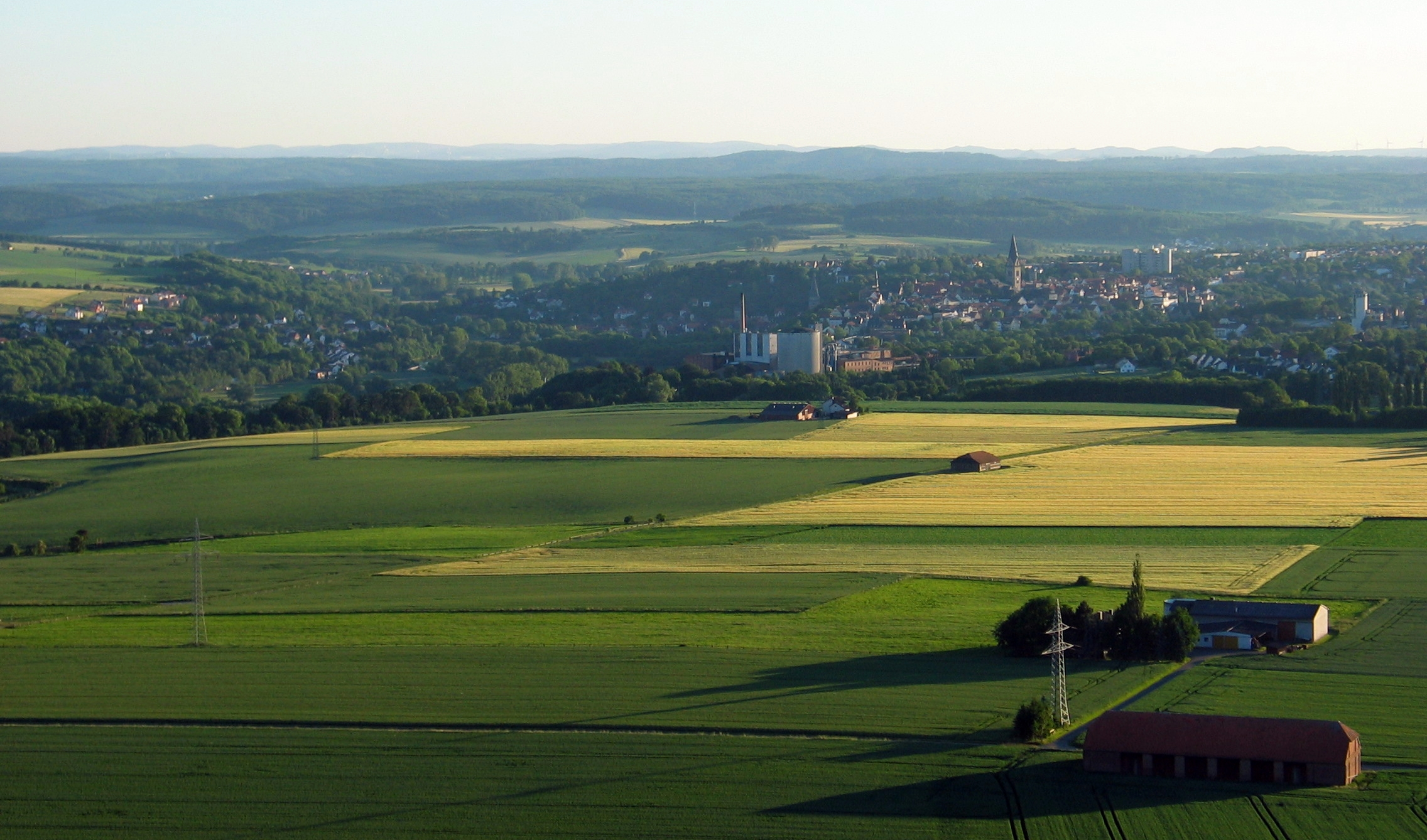 Blick auf Warburg vom Desenberg aus gesehen. Links das Diemeltal, im Vordergrund die Zuckerfabrik und der Bahnhof und in der Mitte die Altstadt